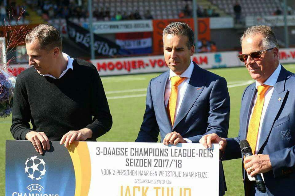 Fotograaf: Frank Fotograaf Brussel / PéSide